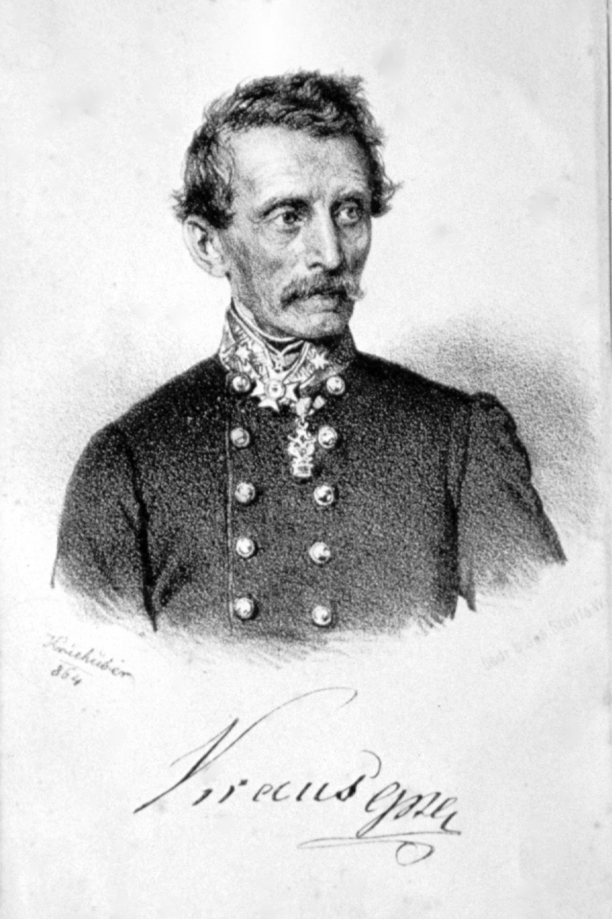 Felix von Kraus (1805-1875), r. med., Generalstabsarzt und Sanitätsreferent. Lithographie von Josef Kriehuber, 1864